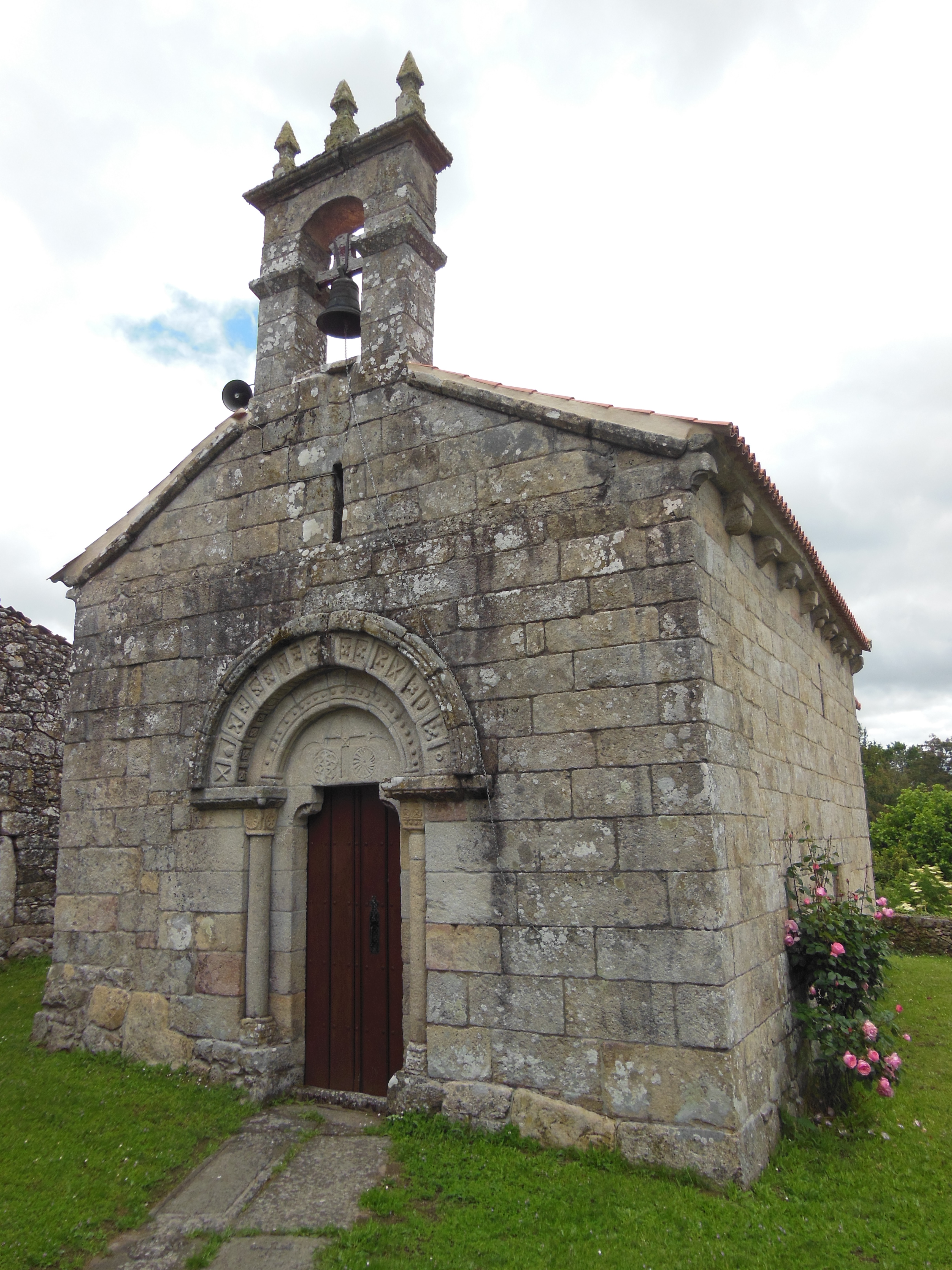 Igrexa parroquial de Vilanuñe (Antas de Ulla)